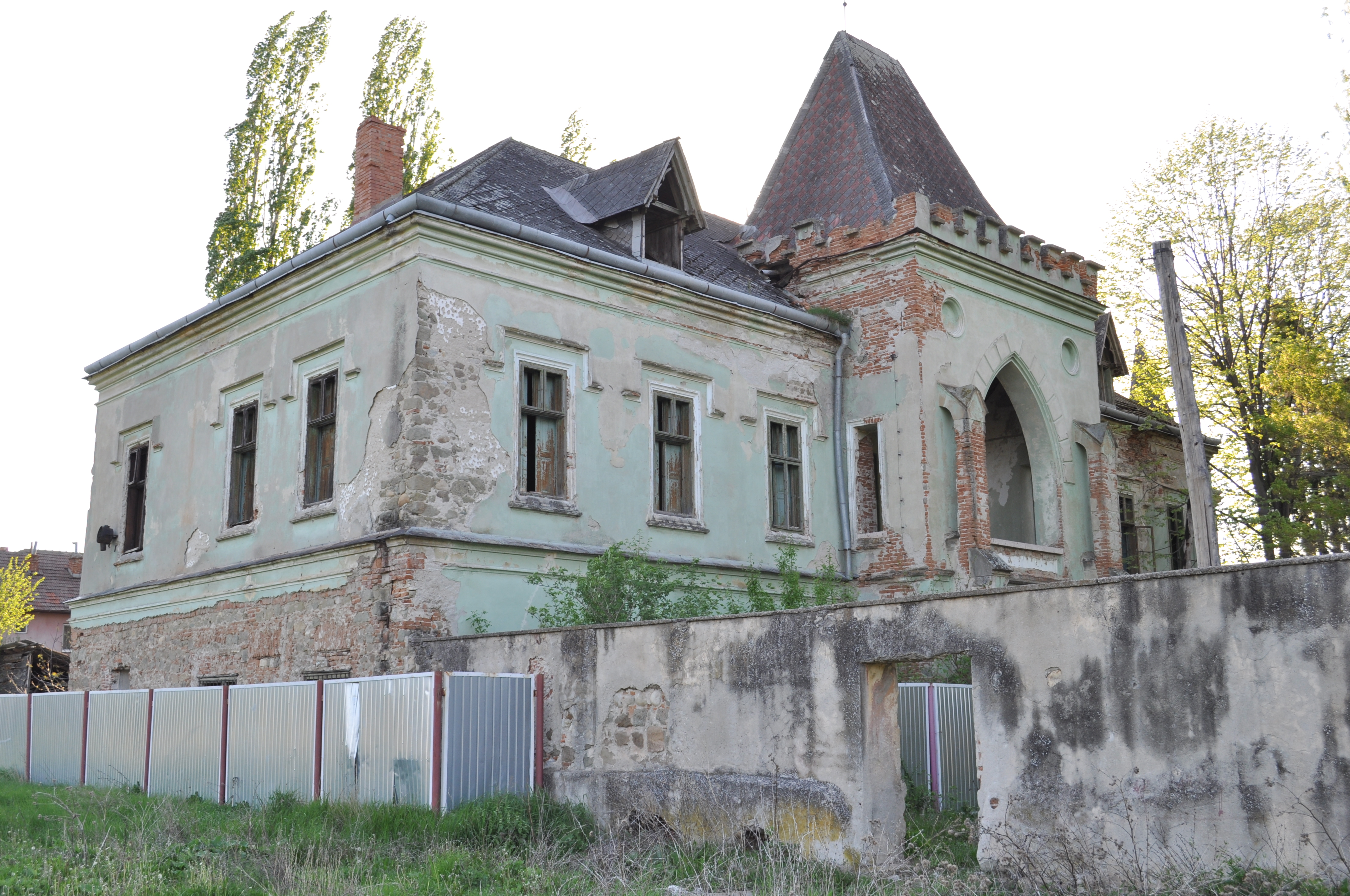 Castelul contelui Nopcsa, sat SĂCEL; comuna SÂNTĂMĂRIA-ORLEA 01